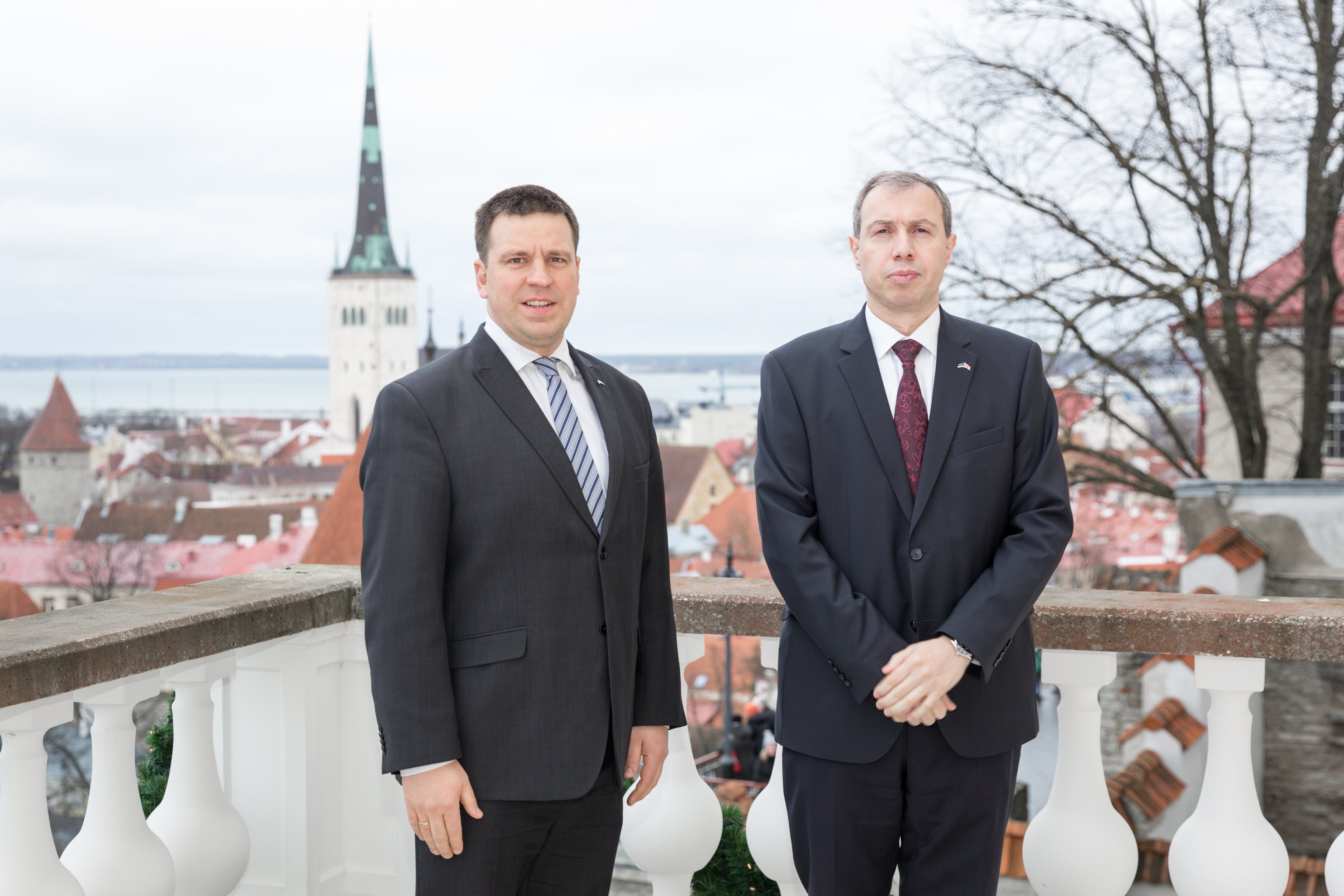 Gruusia suursaadik Archil Karaulashvili Stenbocki majas